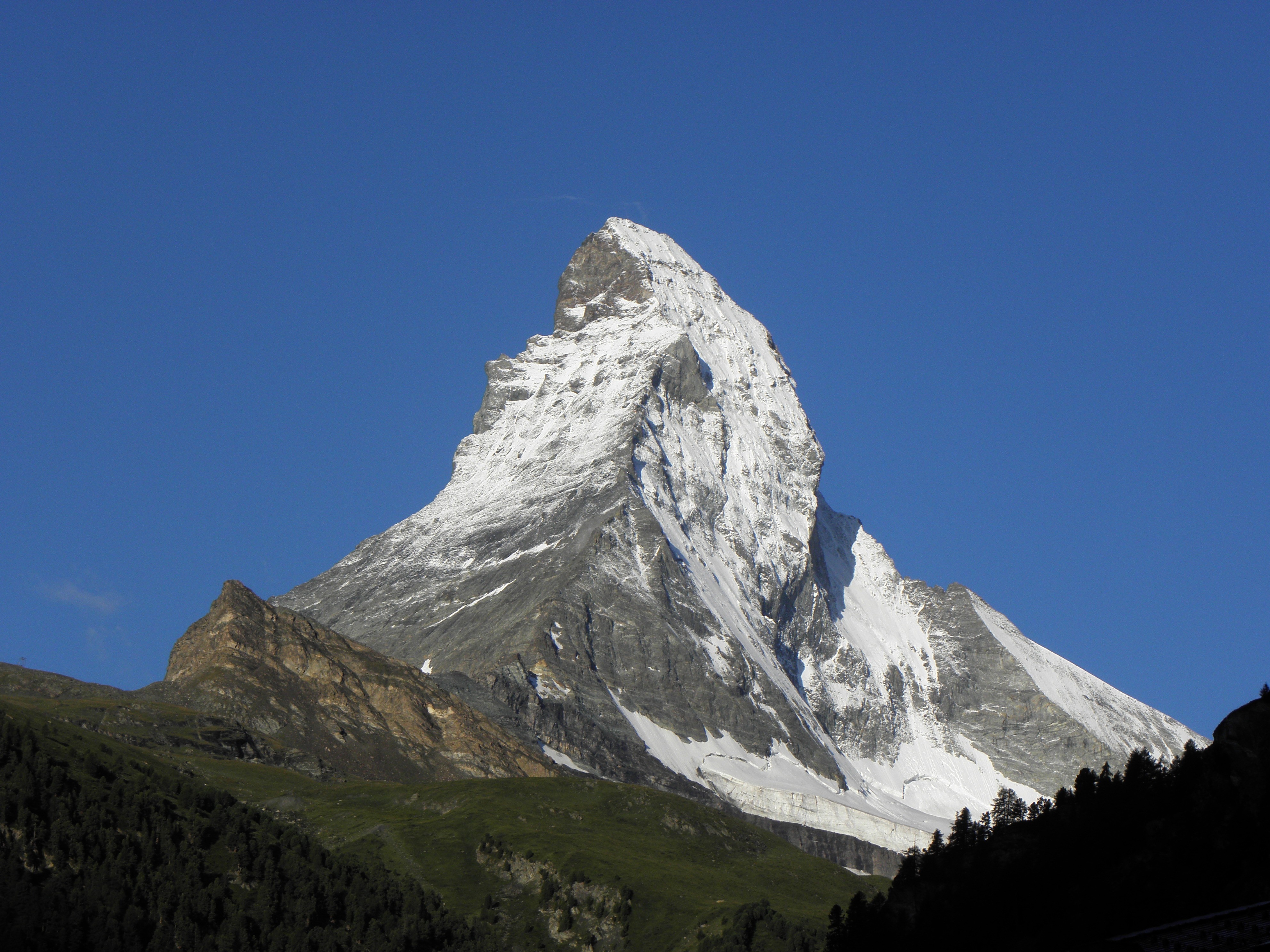 Blick auf das Matterhorn von der Talstation Furi-Seilbahn in Zermatt.